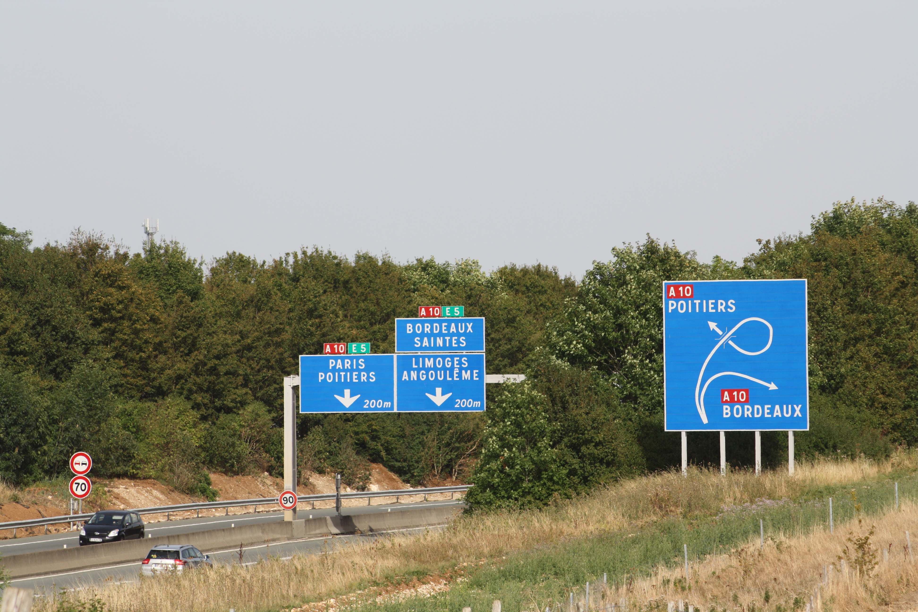 Panneau indiquant la bifurcation pour Poitiers ou Bordeaux via l'autoroute A10 sur l'autoroute A83 en provenance de Nantes